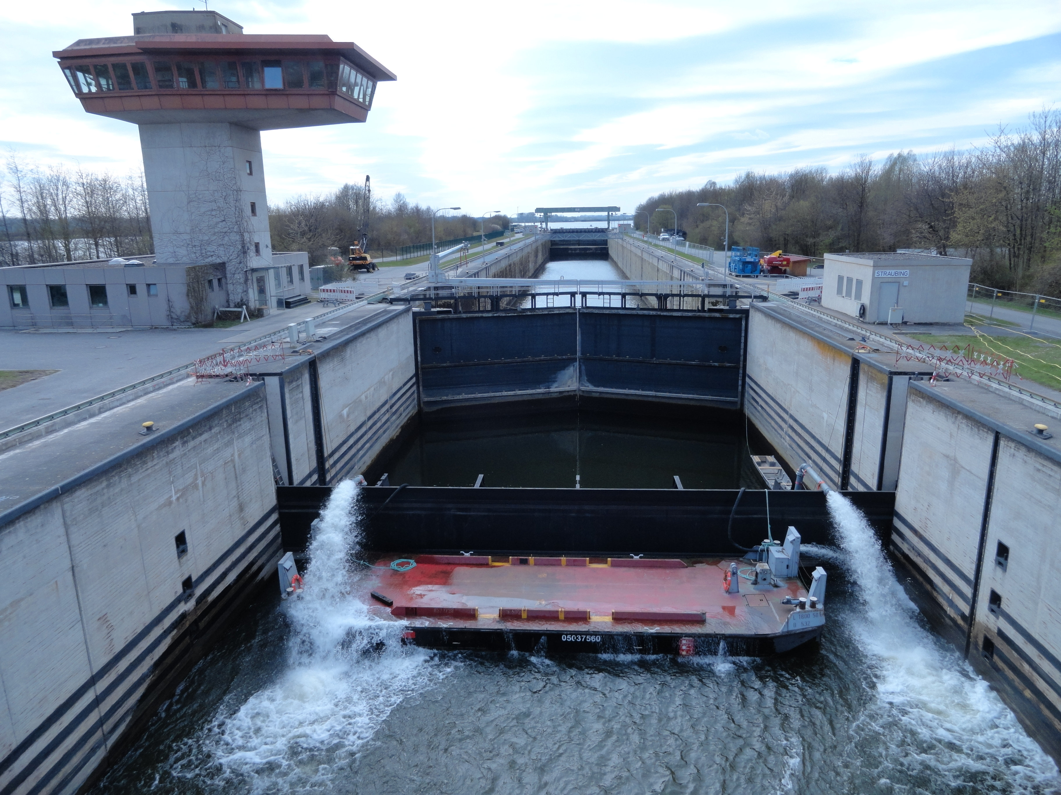 Entleeren der Scheusenkammer in Straubing; am Unterhaupt fördern zwei Pumpen das Wasser aus der Kammer über den eingeschobenen Revisionsverschluss ; der Portalkran ist ans Oberhaupt verfahren worden, wo auch der Revisionsverschluß eingeschoben wurde